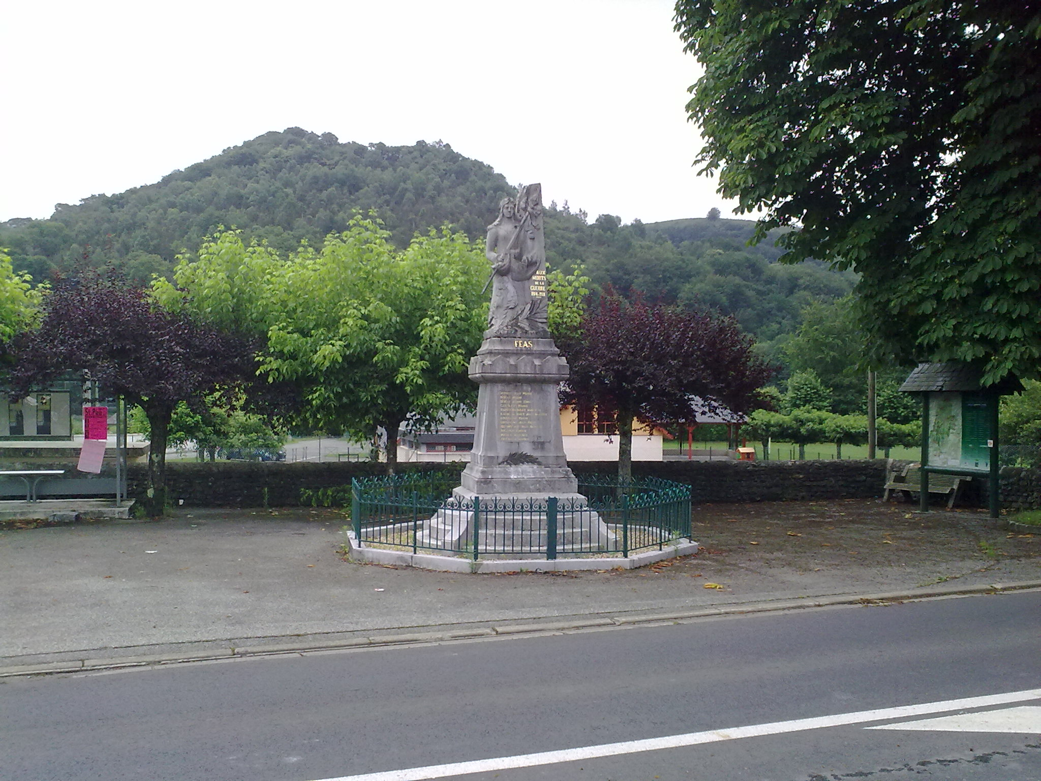 Féas le 4 juillet 2010.